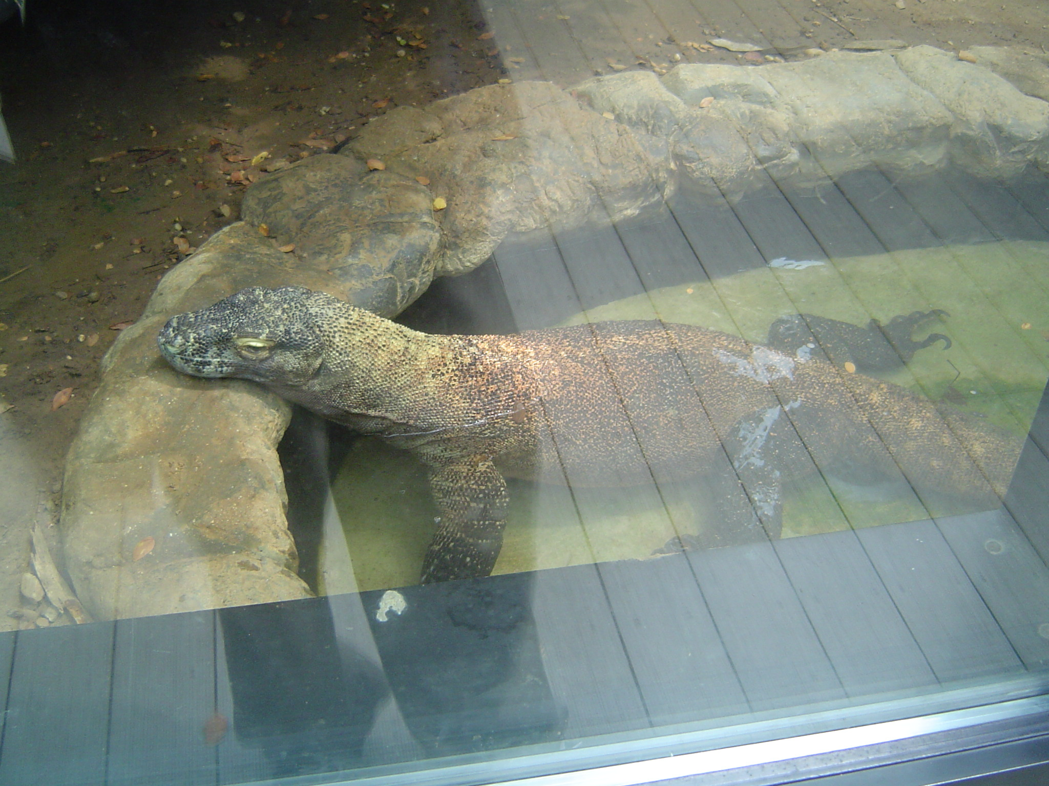 Komodovaran kjøler seg ned i zoologisk hage.